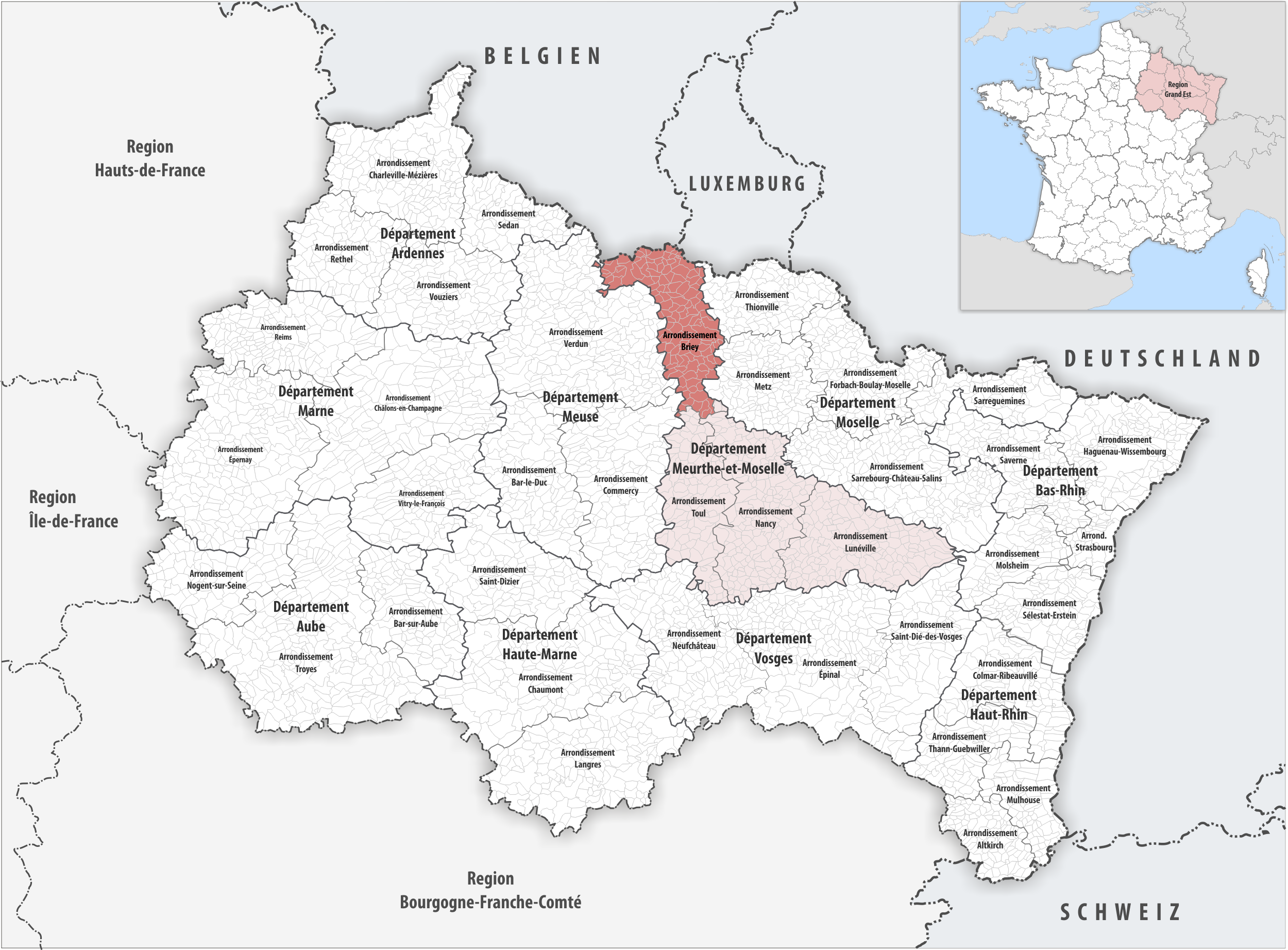 Lage des Arrondissements Briey